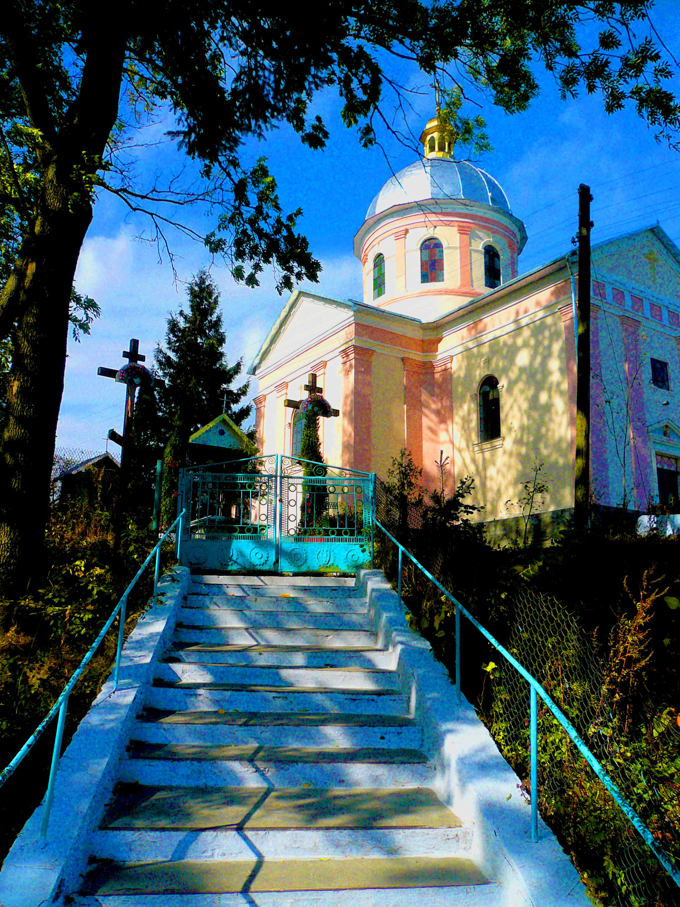 УКРАЇНСЬКА АВТОКЕФАЛЬНА ПРАВОСЛАВНА ЦЕРКВА ПАРАФІЇ ВМЧ.ЮРІЯ У С. ГОЛОГОРИ